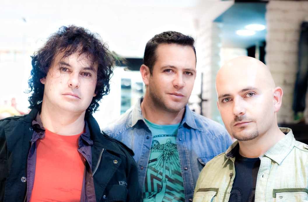 TercerMundo Soy Yo